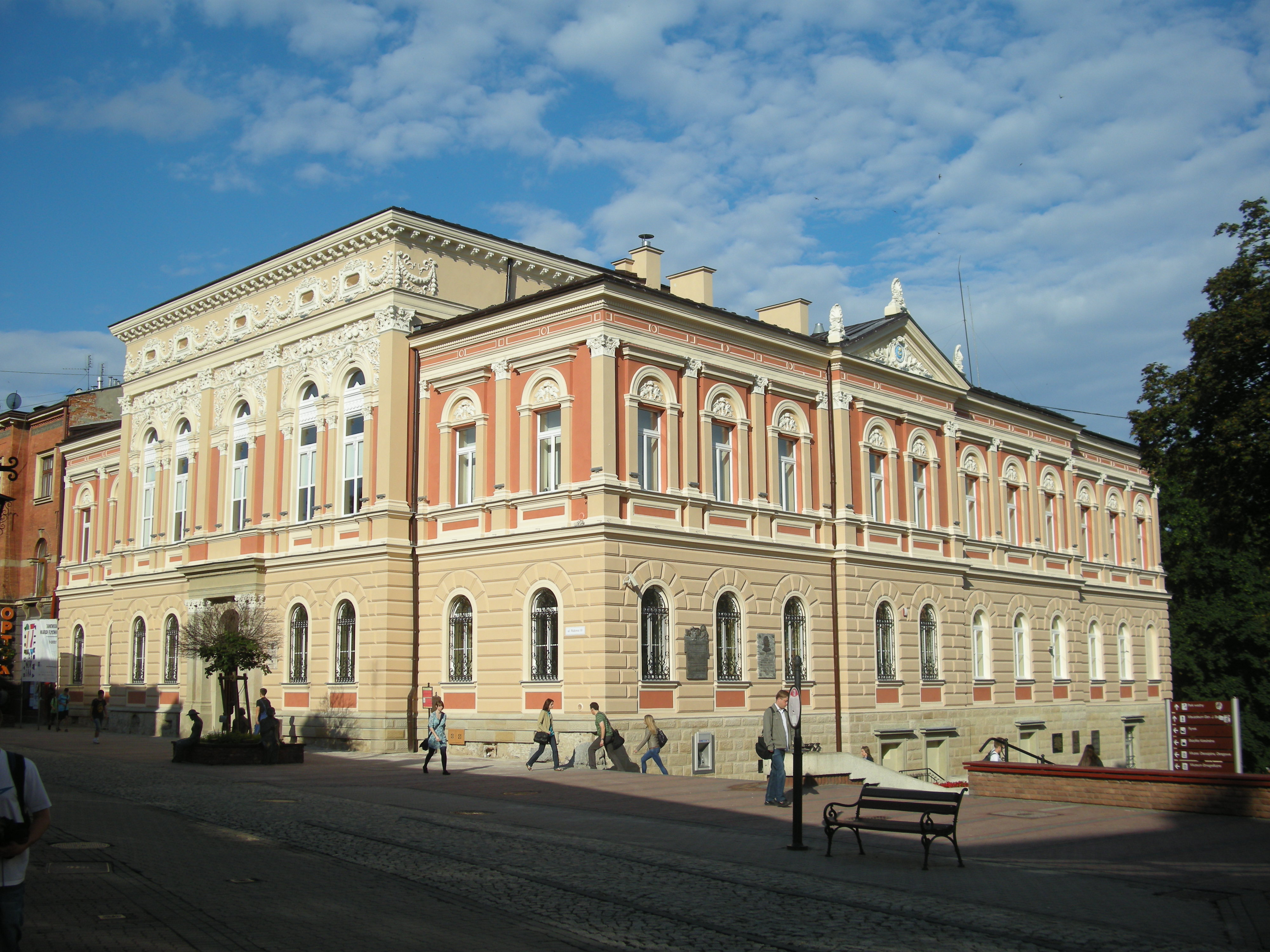 Budynek dawnej Miejskiej Kasy Oszczędności